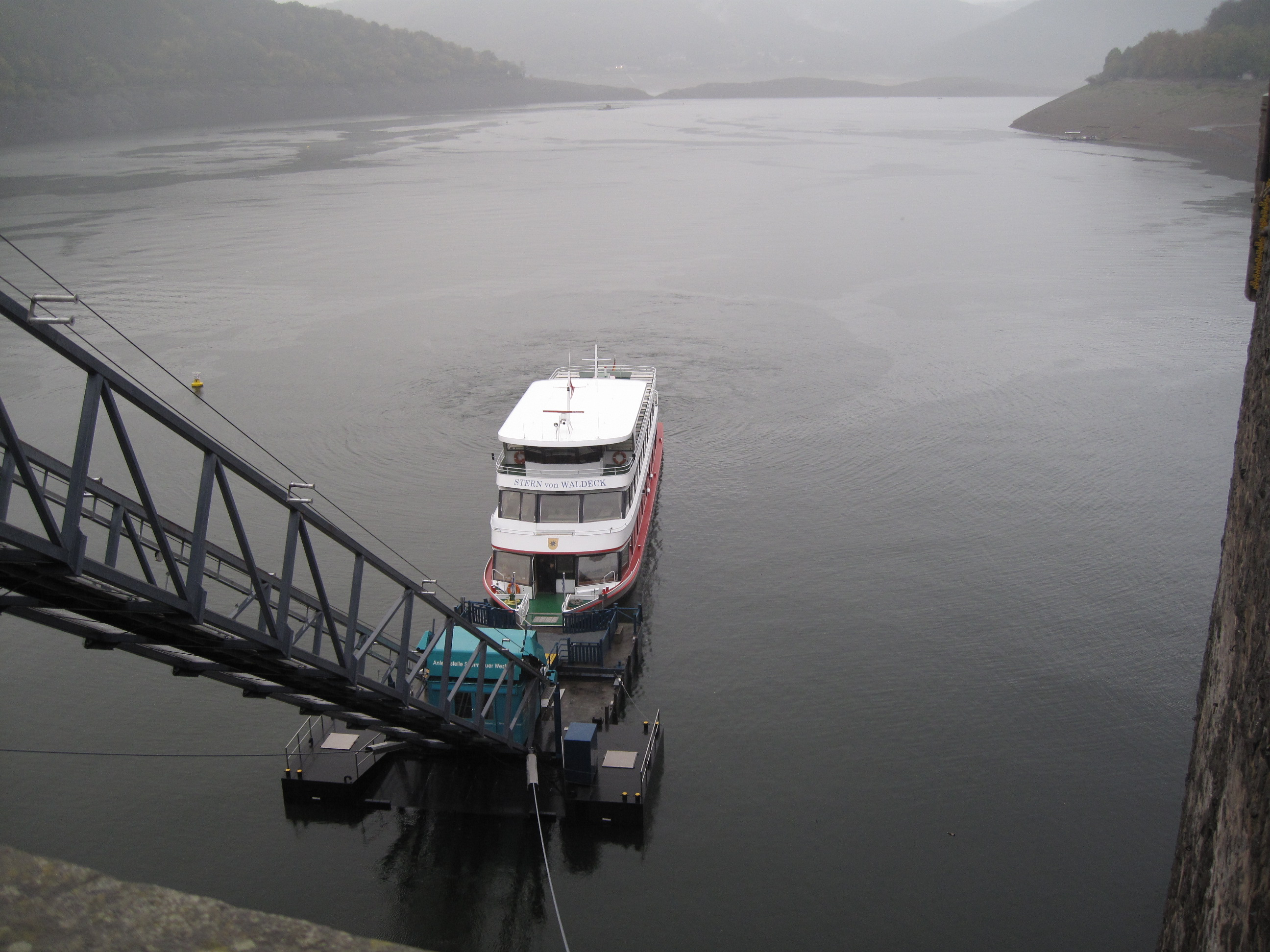 Anleger Edertalsperrmauer Westufer mit Personenkabinenseilbahn.